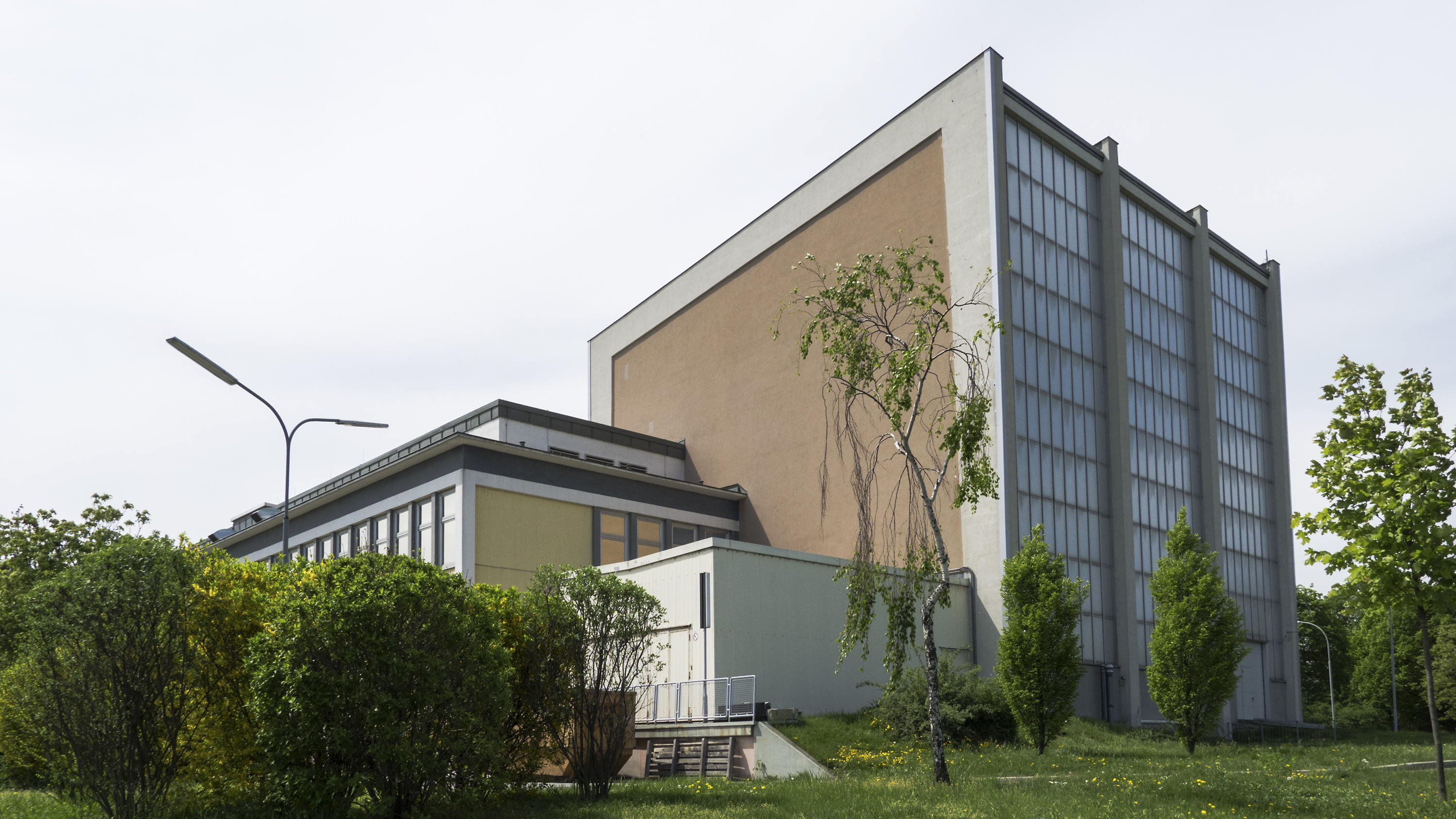 Atominstitut der TU Wien (Praterreaktor) in Wien 2